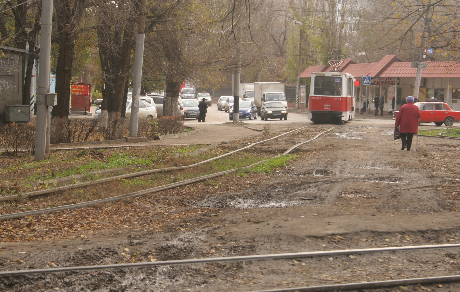 Состояние трамвайных путей в Саратове. Детский парк.